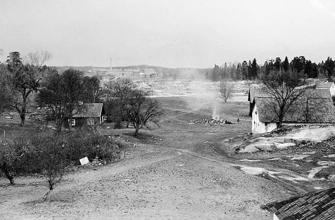 Ladugårdskarlens torpstuga 1932 (till vänster). Publicerat av Stockholms stadsmuseum.